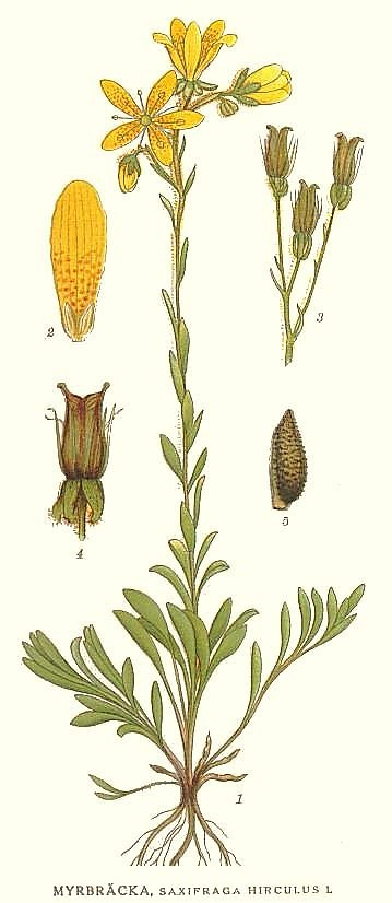 Original Descritption Myrbräcka, Saxifraga hirculus L.